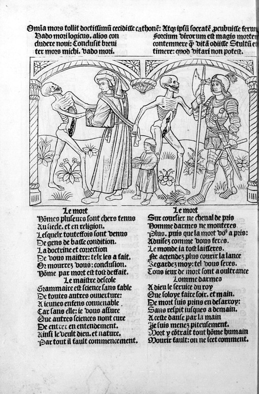 La Danse macabre. Paris, Guy Marchant, 1486 : Un maître d'école et un homme d'armes. Illustration numérisée d'après le microfilm R 1760, Paris, BnF (Réserve des Livres rares et précieux), cote : Res Ye 189/Microfilm R 1760